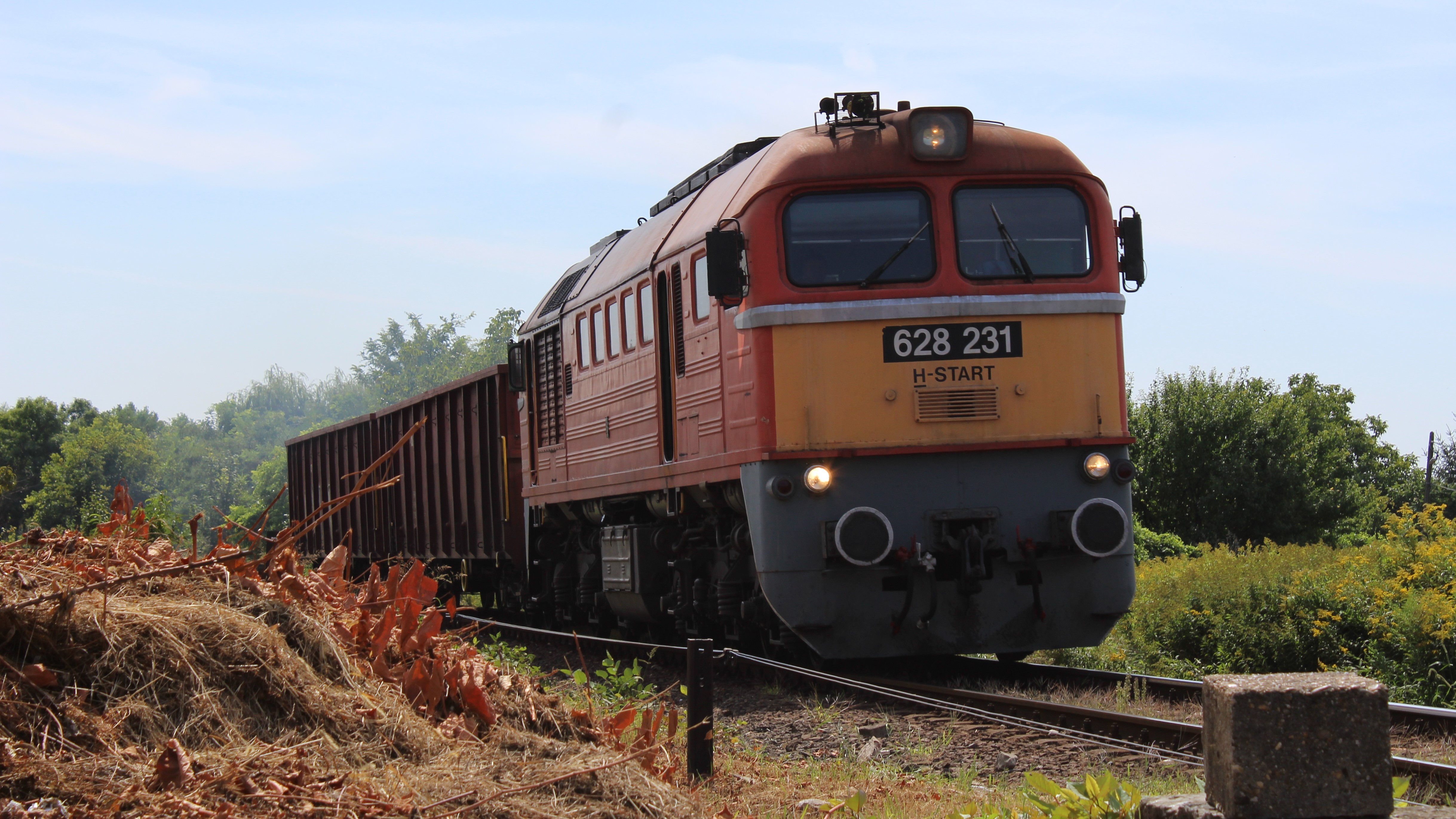 M62 Szergej jár be tolatós tehervonatával Bajára